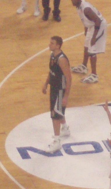 Anrija Zizic. PAO-EFES